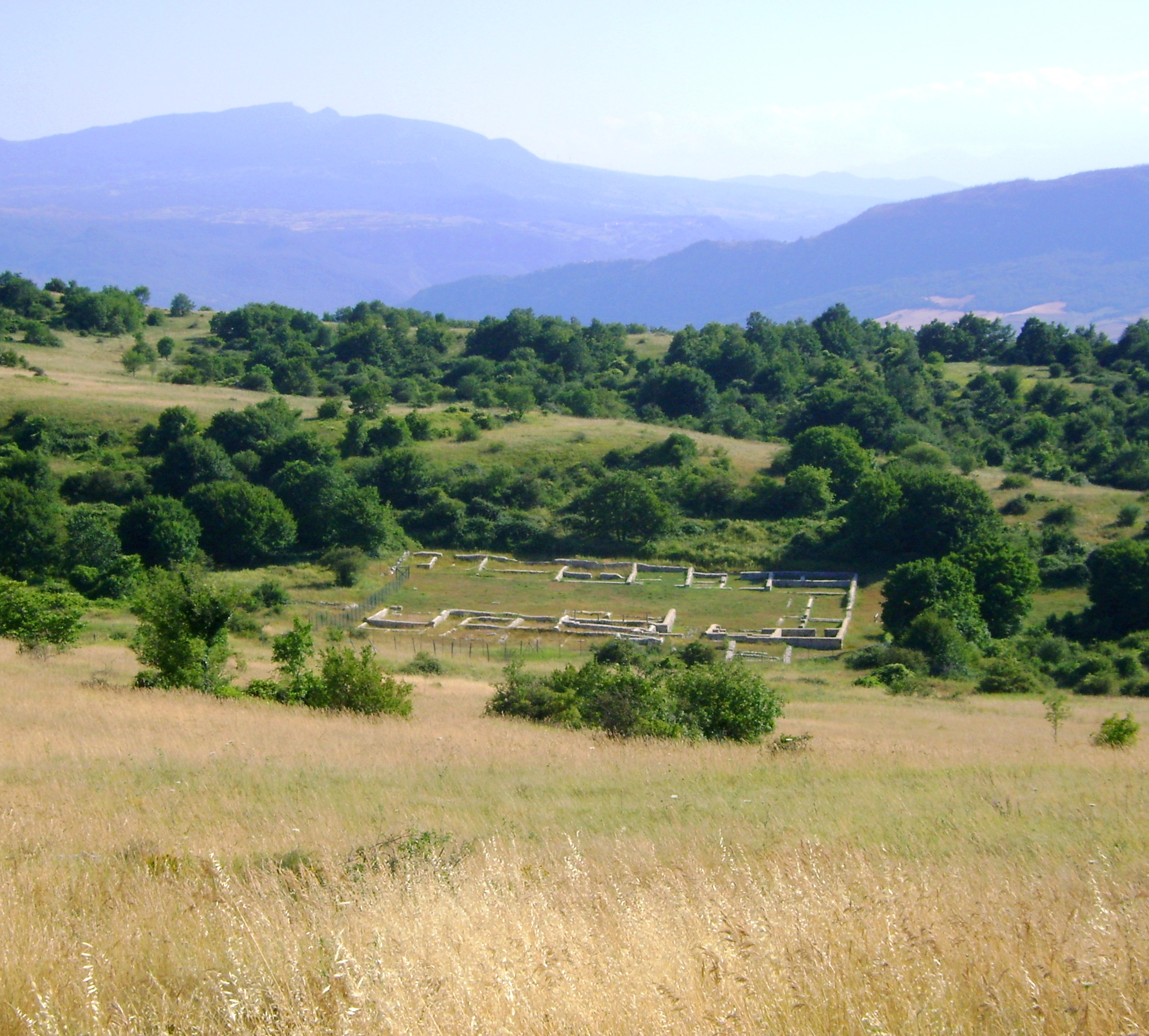 Sito archeologico romano di Monte Pallano, provincia di Chieti.